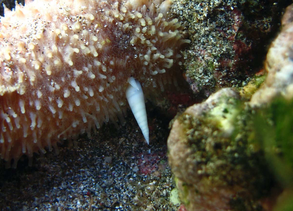 Deux Eulimidae (gastéropodes parasites) sur le trivium d'un juvénile Holothuria verrucosa, à la Réunion.